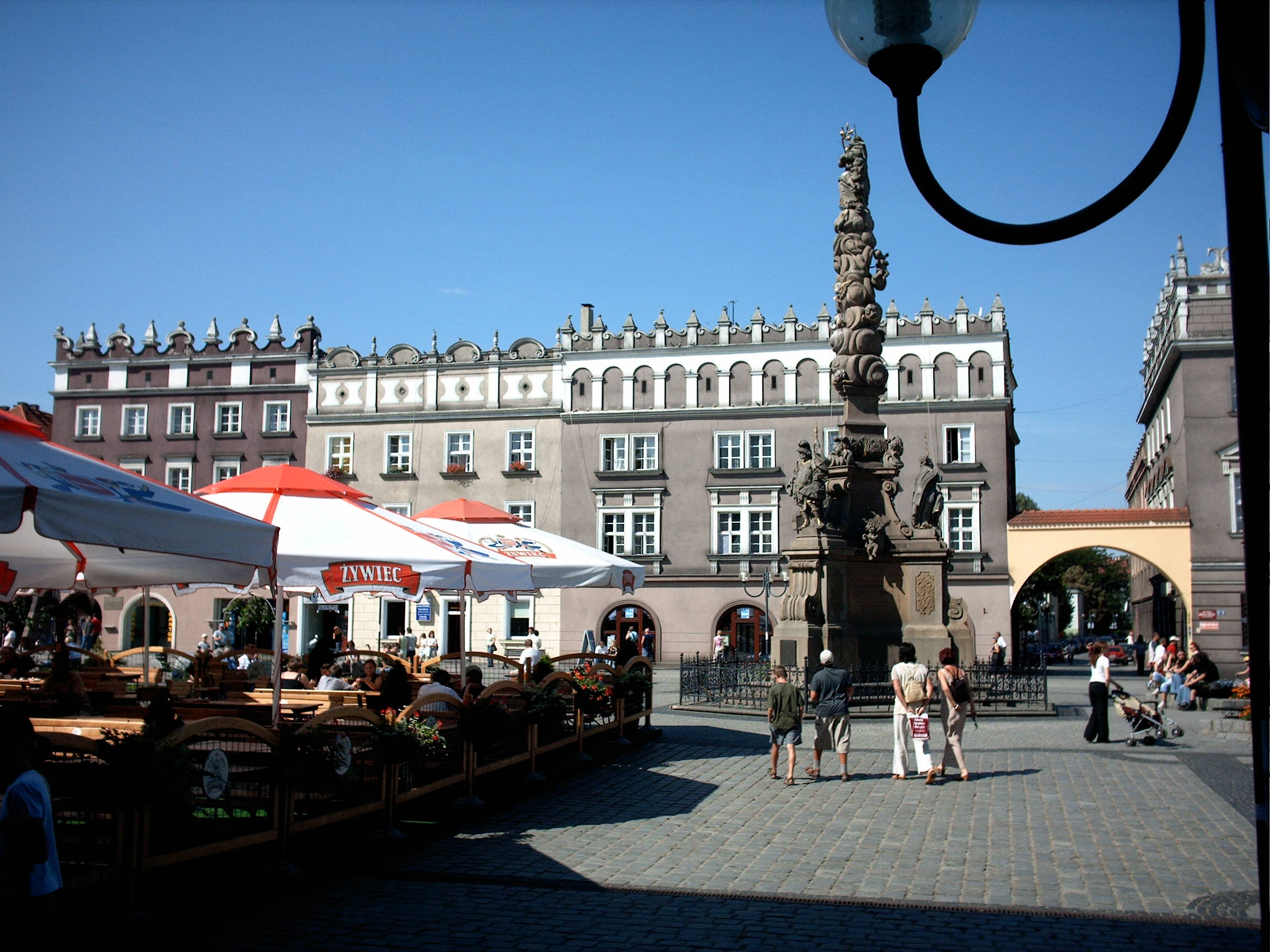 Bei meinem Besuch in Ratibor (August 2004) habe ich auf dem Rynek (Marktplatz) dieses Bild geschossen. Es zeigt die Mariensäule, im Hintergrund die historischen Häuser. Gemeinfrei